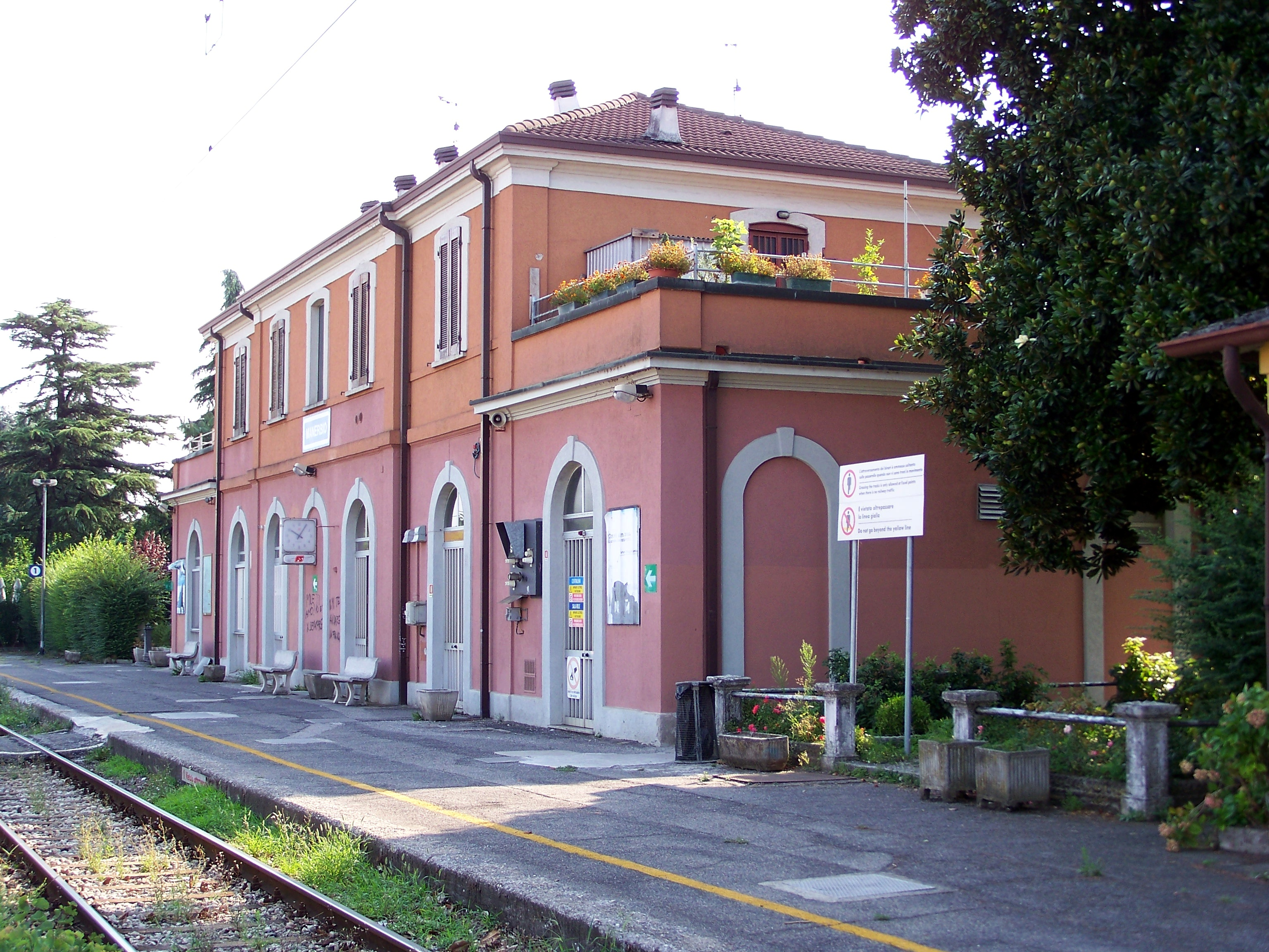 Lato ferrovia della Stazione di Manerbio sulla ferrovia Brescia-Cremona.